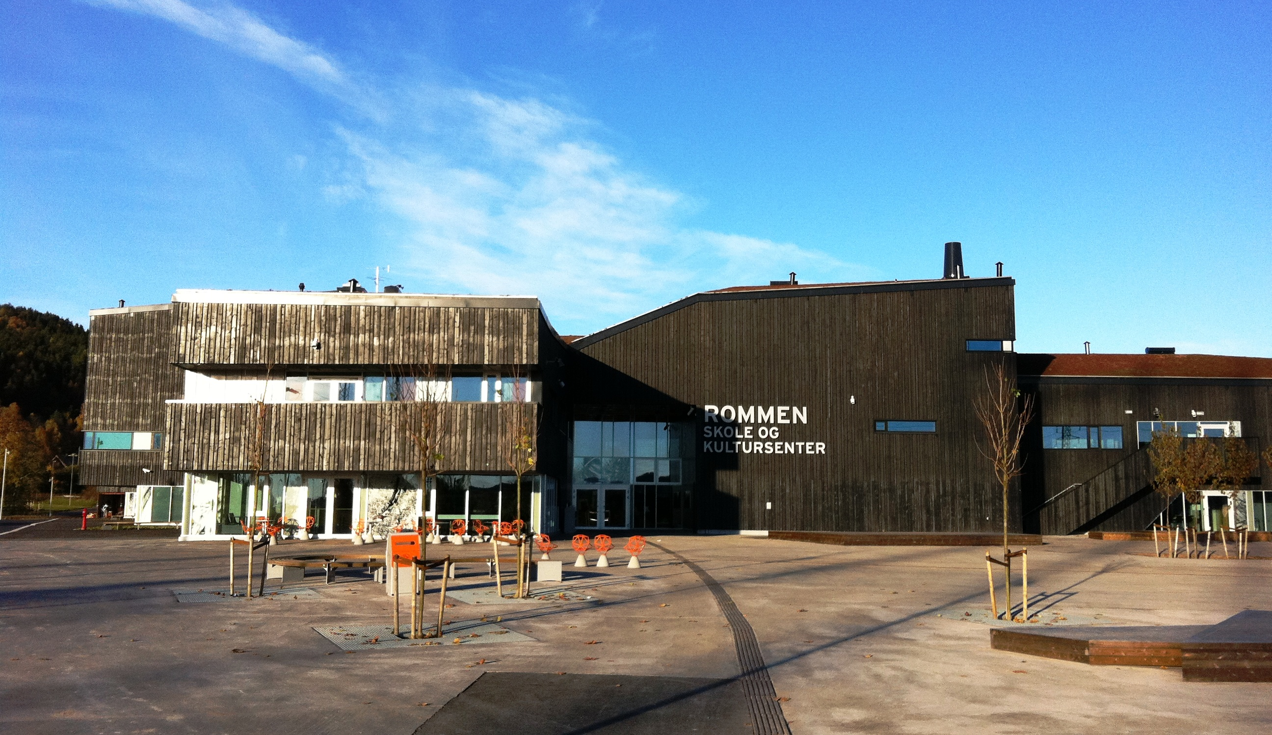 Rommen School (Rommen Skole) in Stovner, Oslo